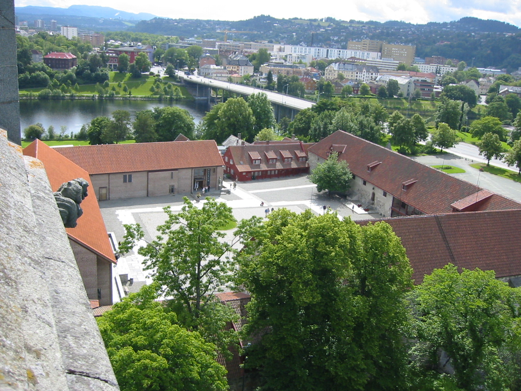 Overlooking Archbishop's palace, Nidelva and Elgeseter bridge in Trondheim. View from Cathedral tower.